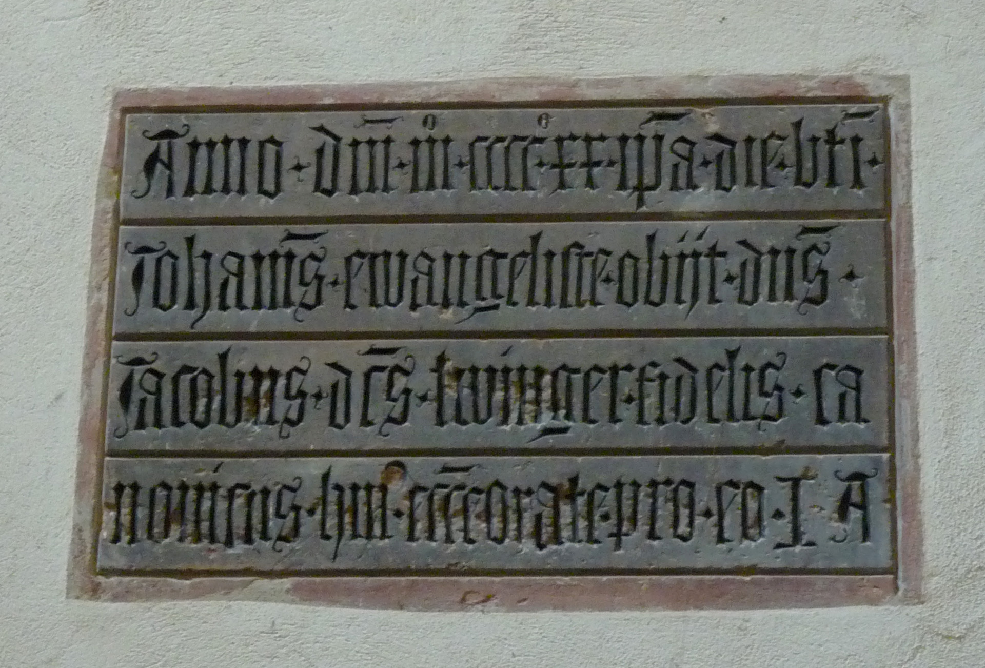 Epitaphe de l'historien Jakob Twinger de Koenigshoffen à l'église Saint-Thomas de Strasbourg